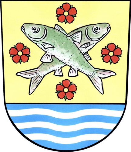 znak, Dobrá Voda, okres Žďár nad Sázavou